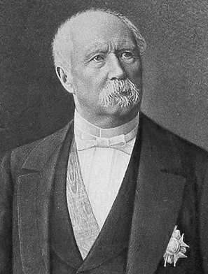 Patrice de Mac Mahon, portrait officiel (Pierre Petit photographe)